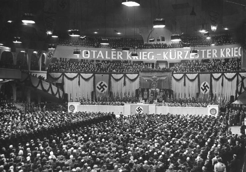 Das deutsche Volk fordert den grossen Krafteinsatz zur Erzwingung des Sieges. Am Donnerstagabend fand im Berliner Sportpalast eine Grosskundgebung der Bevölkerung Berlins statt, in der Reichsminister Dr. Goebbels mit schonungsloser Offenheit die Gefahr aufzeigte, in der Europa schwebt. Die von dem alten nationalsozialistischen Kampfgeist getragene Veranstaltung brachte das einmütige und leidenschaftliche Bekenntnis der Teilnehmer, der Männer und Frauen, der Ritterkreuzträger und Rüstungsarbeiter, der Verwundeten und zahllosen Männer aus allen Schaffens- und Wissensgebieten, den Krieg rücksichtslos und in seiner radikalsten Totalität zu führen und den Sieg über den Bolschewismus zu erzwingen. UBz: Uebersicht über den Sportpalast während der Kundgebung. Fot. Schwahn 18.2.1943 J 5235